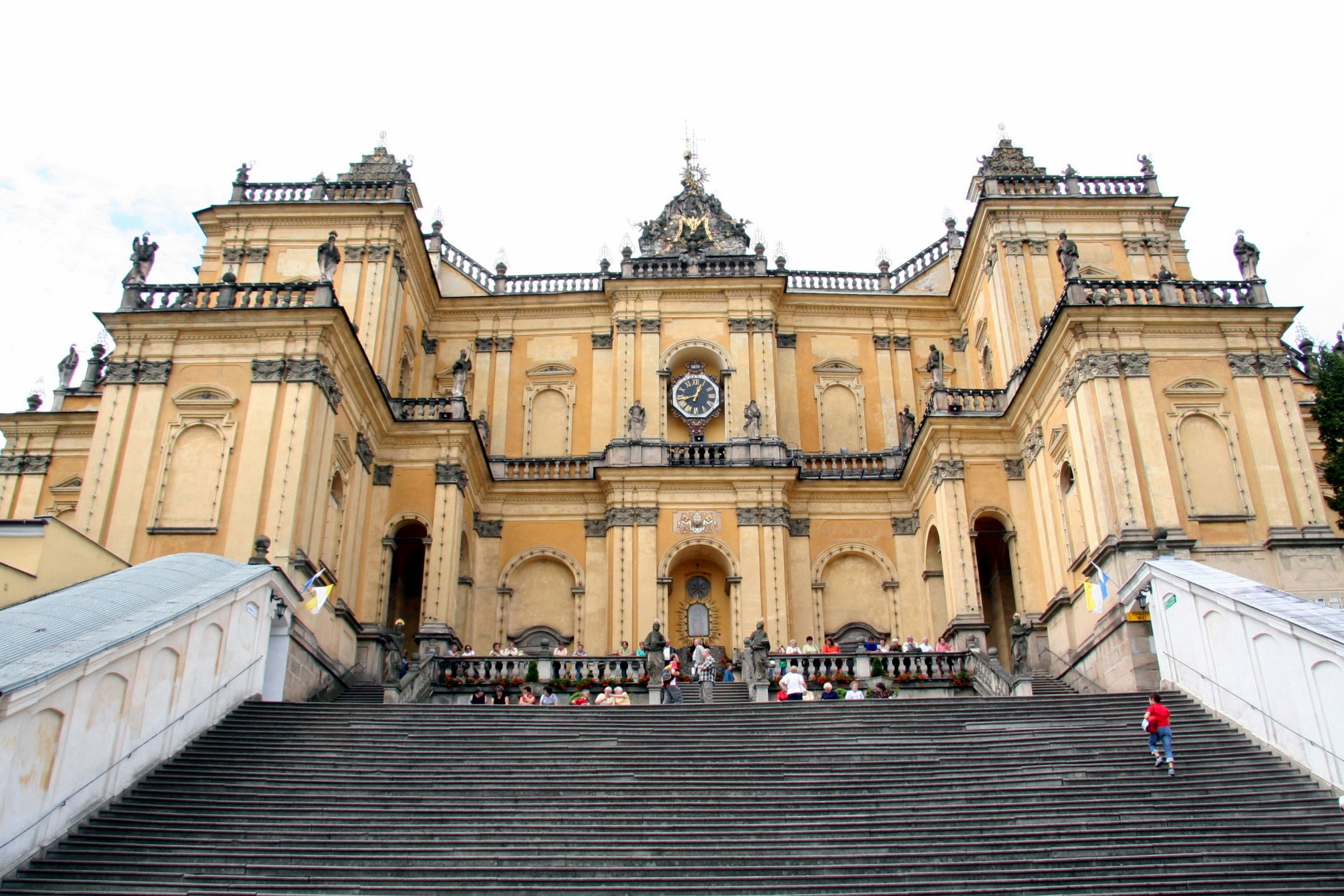 Albendorf, Wallfahrtskirche